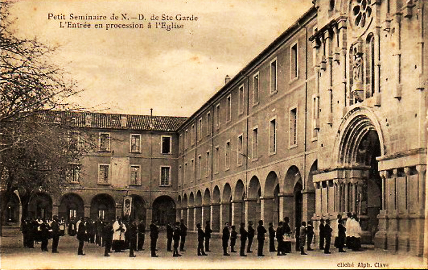 Petit séminaire de Sainte-Garde